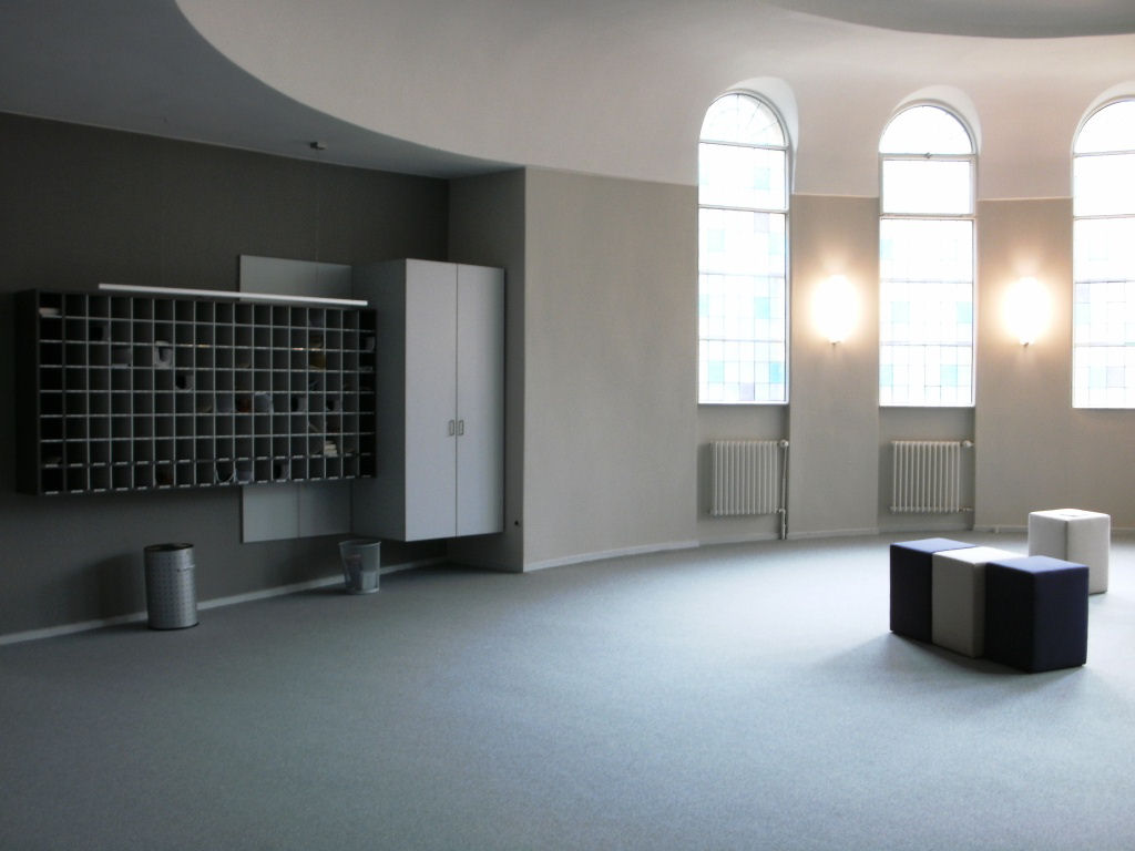 Christuskirche Altona in Hamburg, Deutschland - Evangelisch-Freikirchliche Gemeinde (Baptisten)